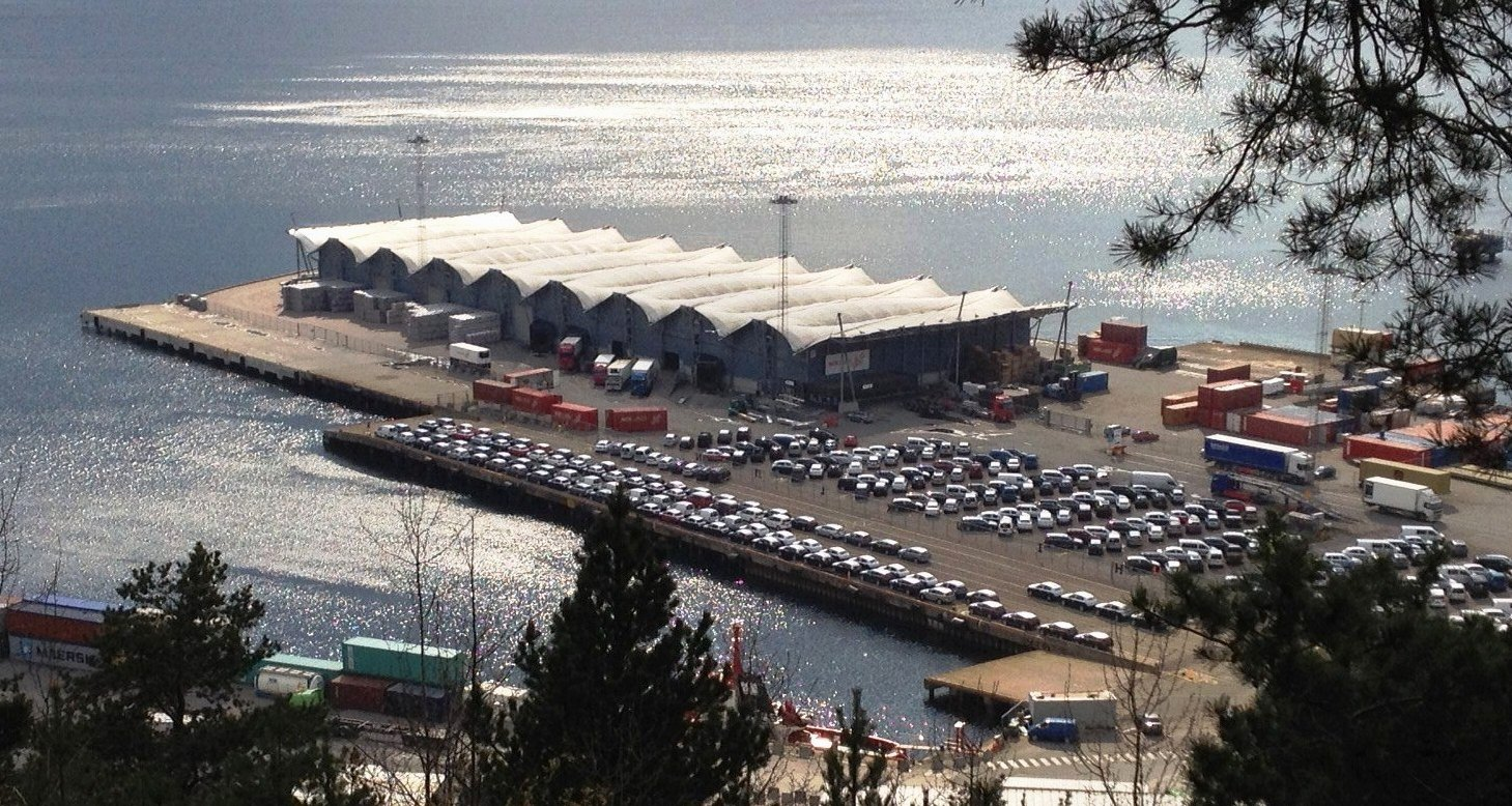 Kneppeskjærutstikkeren sør for Sjursøya, Oslo